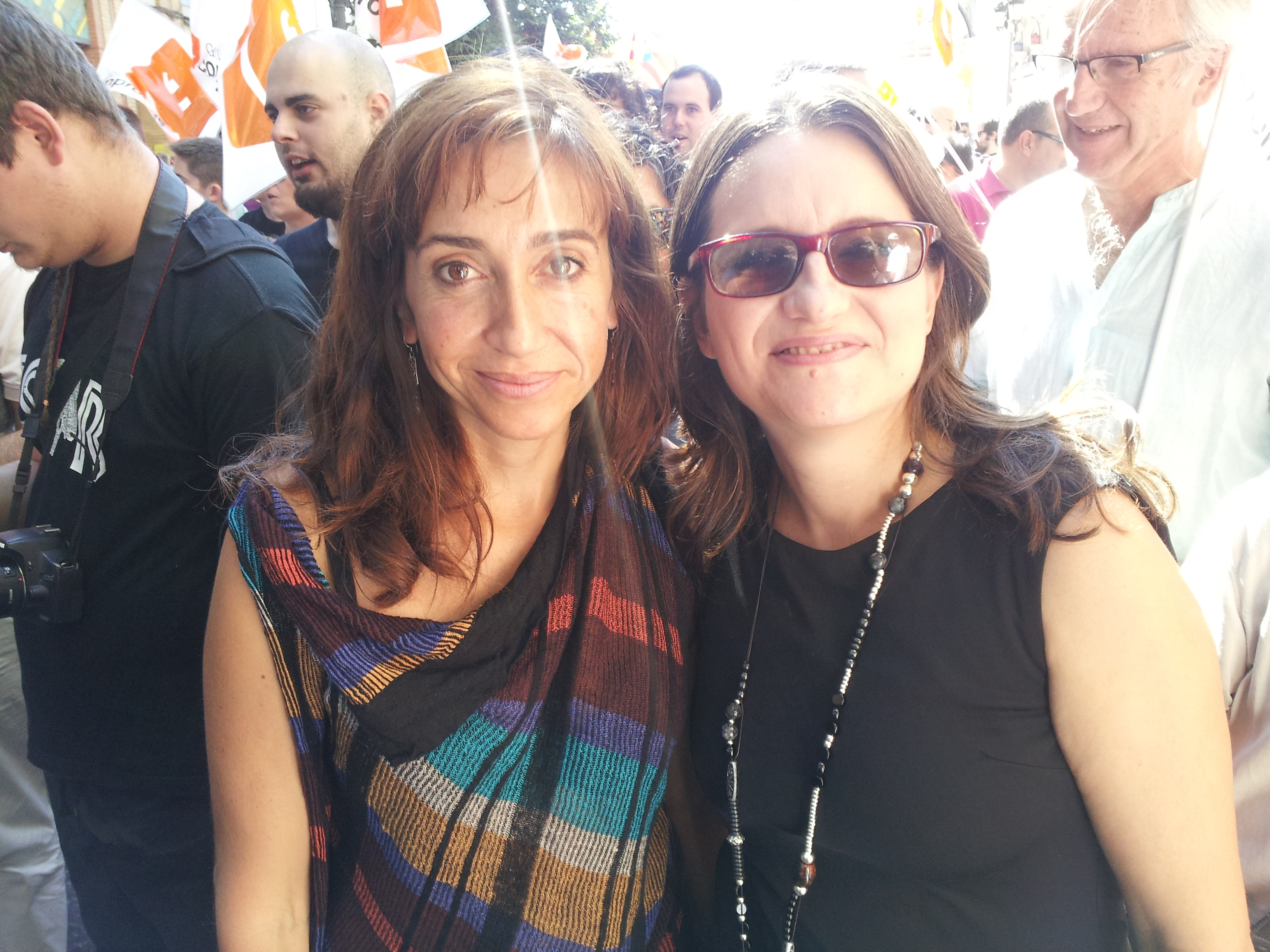 Isaura Navarro i Mònica Oltra (IdPV).